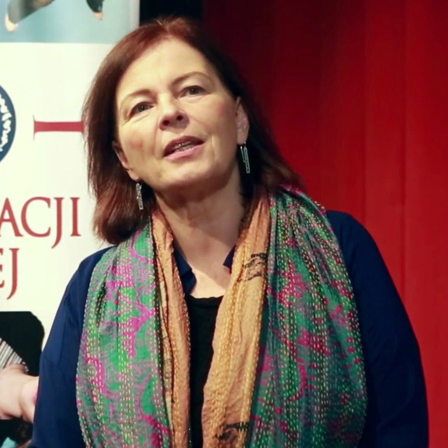 Alicja Pacewicz, działaczka społeczna i oświatowa.